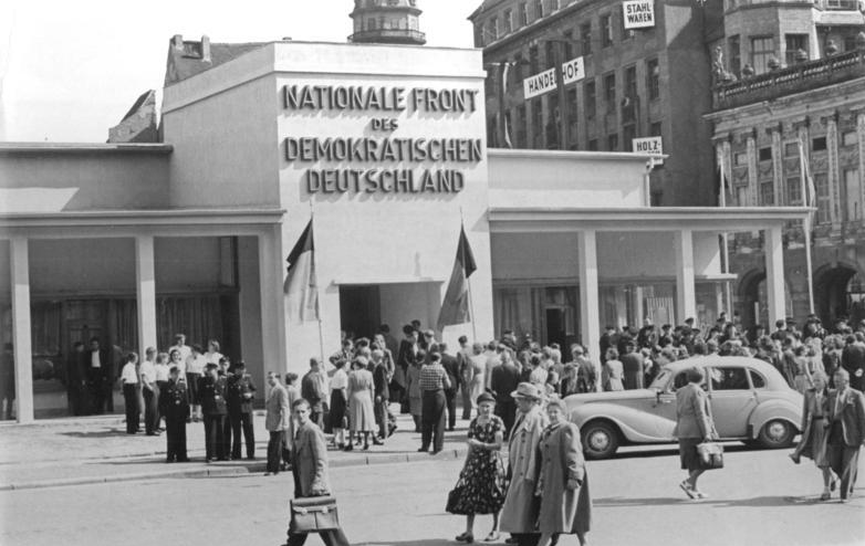 Leipzig, Herbstmesse, Pavillon der Nationalen Front Zentralbild Illner 2.9.1953 Leipziger Messe 1953 Am 31.8.1953 wurde der Pavillon der Nationalen Front, der ein Zentrum für die Wiedervereinigung unseres Vaterlandes in der Messestadt ist, in einer Feierstunde wiedereröffnet. Am 17. Juni 53 wurde dieser Pavillon von faschistischen Provokateuren zerstört, jedoch mit Hilfe vieler freiwilliger Aufbauhelfer bis zur diesjährigen Messe wiedererrichtet. UBz: Der neuerrichtete Pavillon der Nationalen Front.